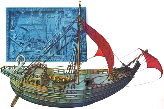 Erromatar merkataritza ontziak